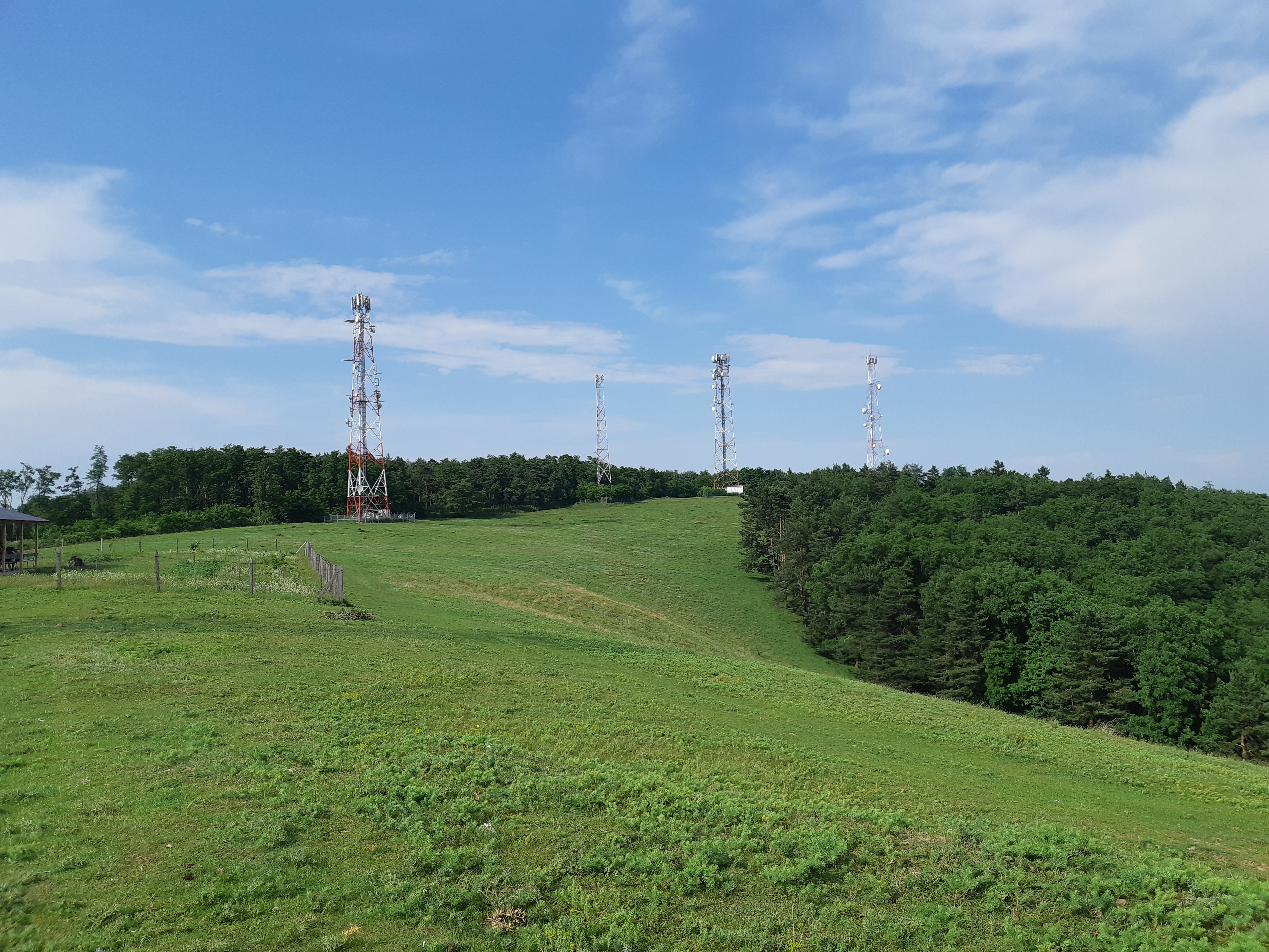 Dealul Boiştea - releele din vârf.